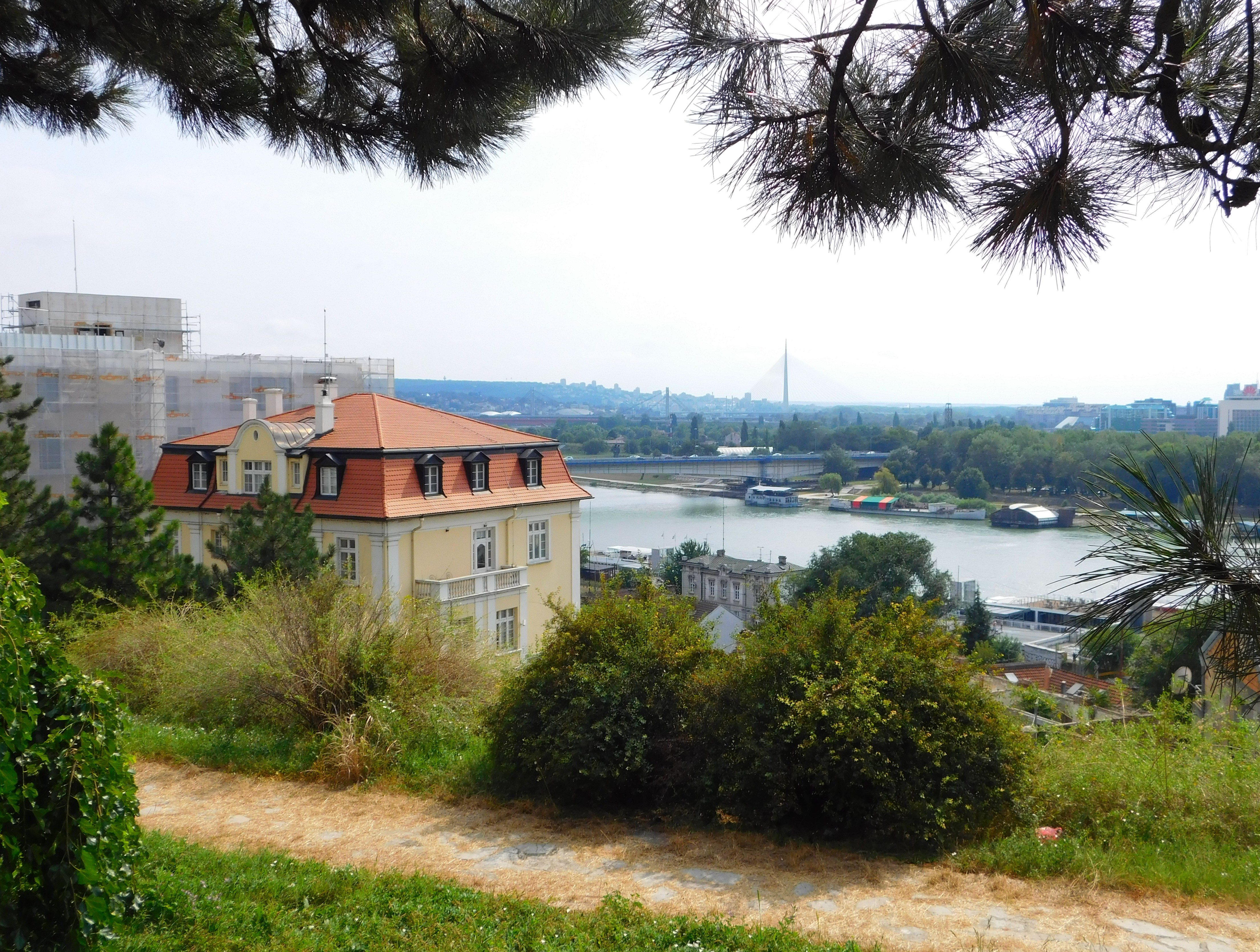 Autor fotografie: Мартин Грендел